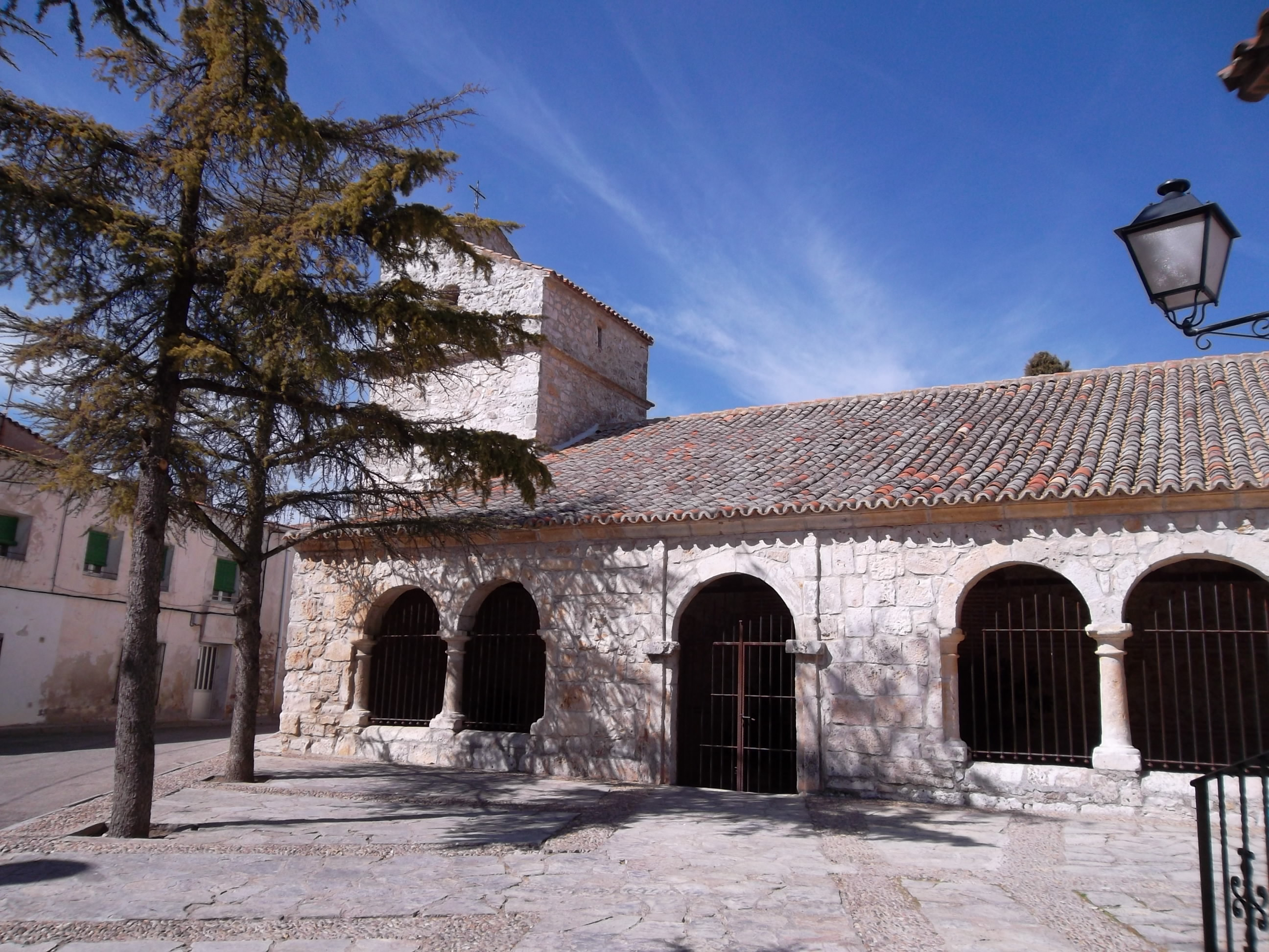 Pozo de Guadalajara-Iglesia parroquial porticada consagrada a San Mateo Apóstol (s.XIV). El átrio.